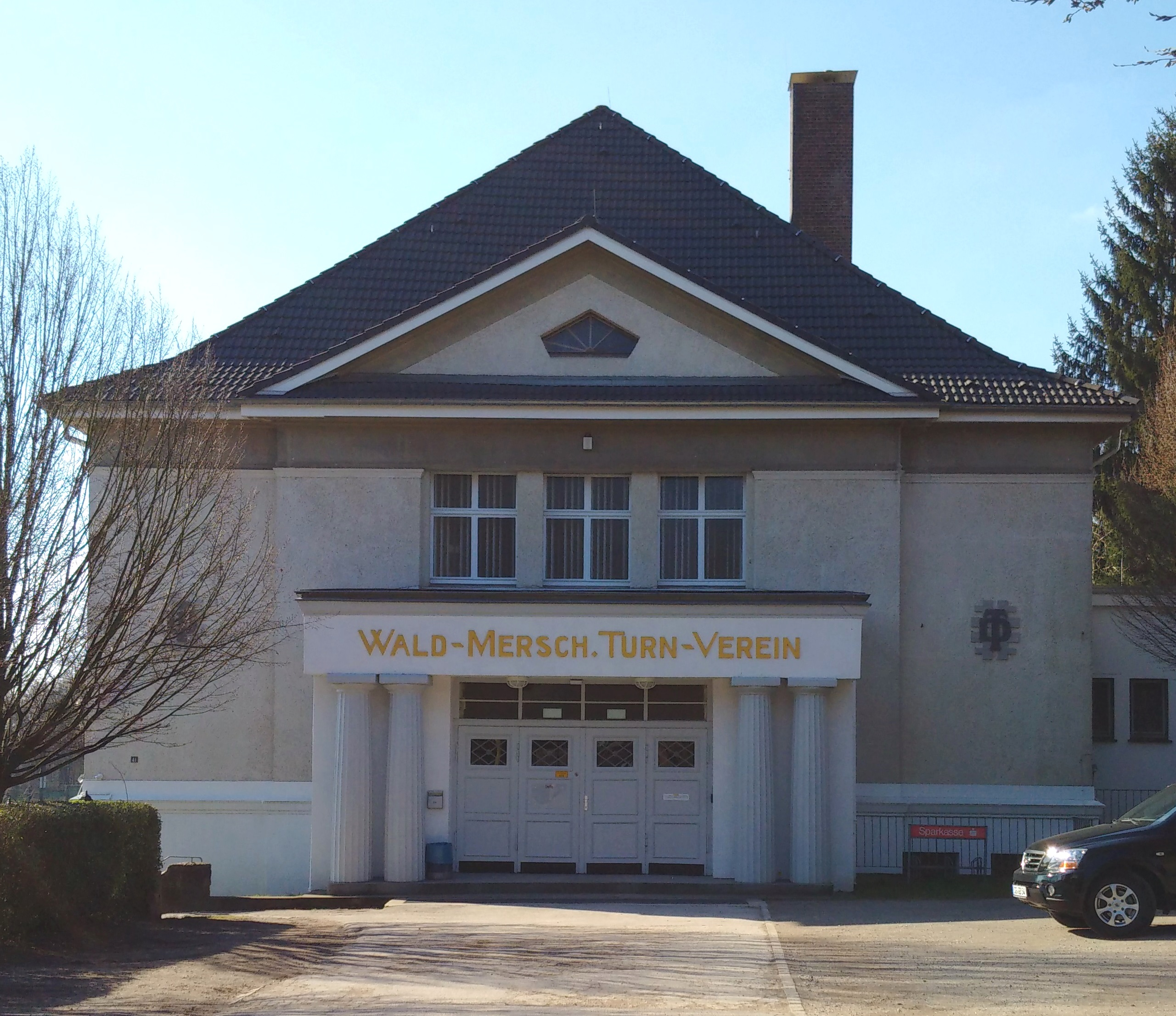 Turnhalle des WMTV in Solingen-Wald, aufgenommen im Februar 2016